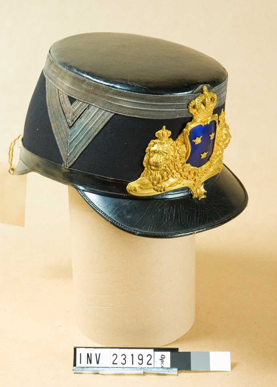 Käppi m/1878 Identifikationsnr: AM.023192 Samling: Armémuseum